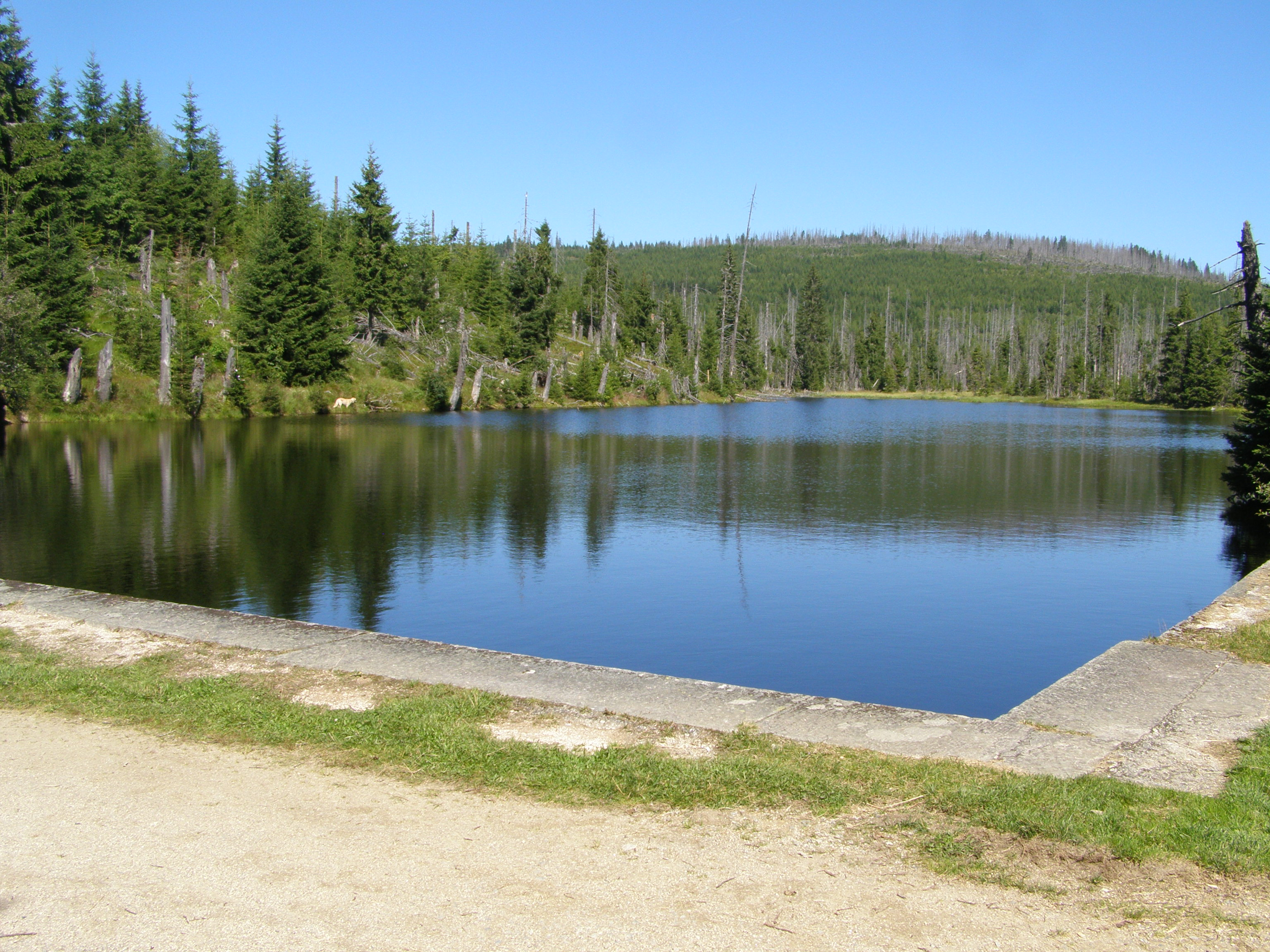 Vodní splavovací nádrž Reschbachklause v Národním parku Bavorský les; nedaleko hraničního přechodu do Národního parku Šumava (Česká republika). Na trase z Finsterau k vrcholu Siebensteinkopf.